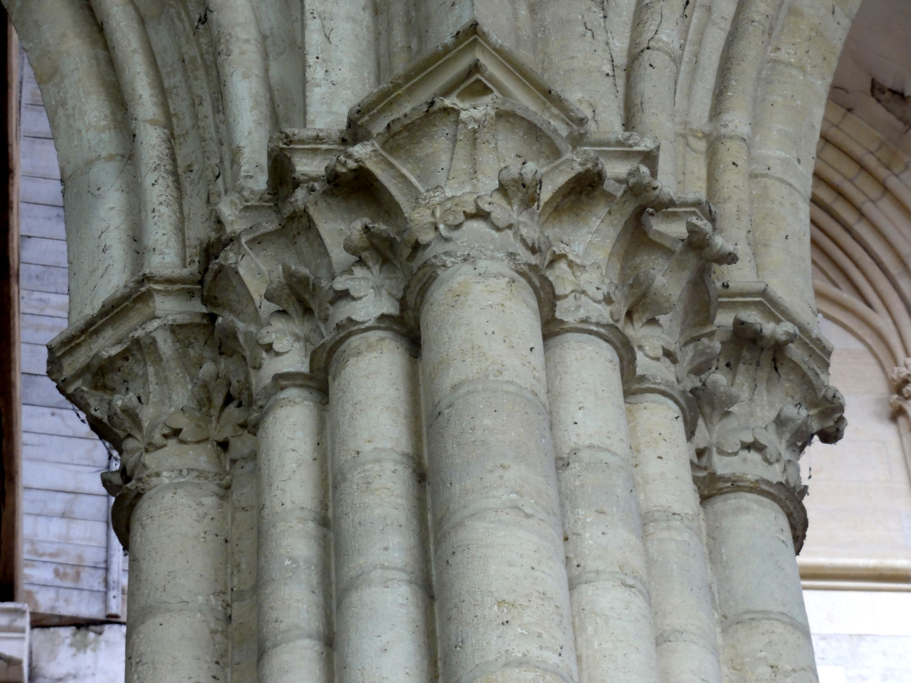 Collatéral sud, chapiteaux d'un pilier des grandes arcades, côté sud.